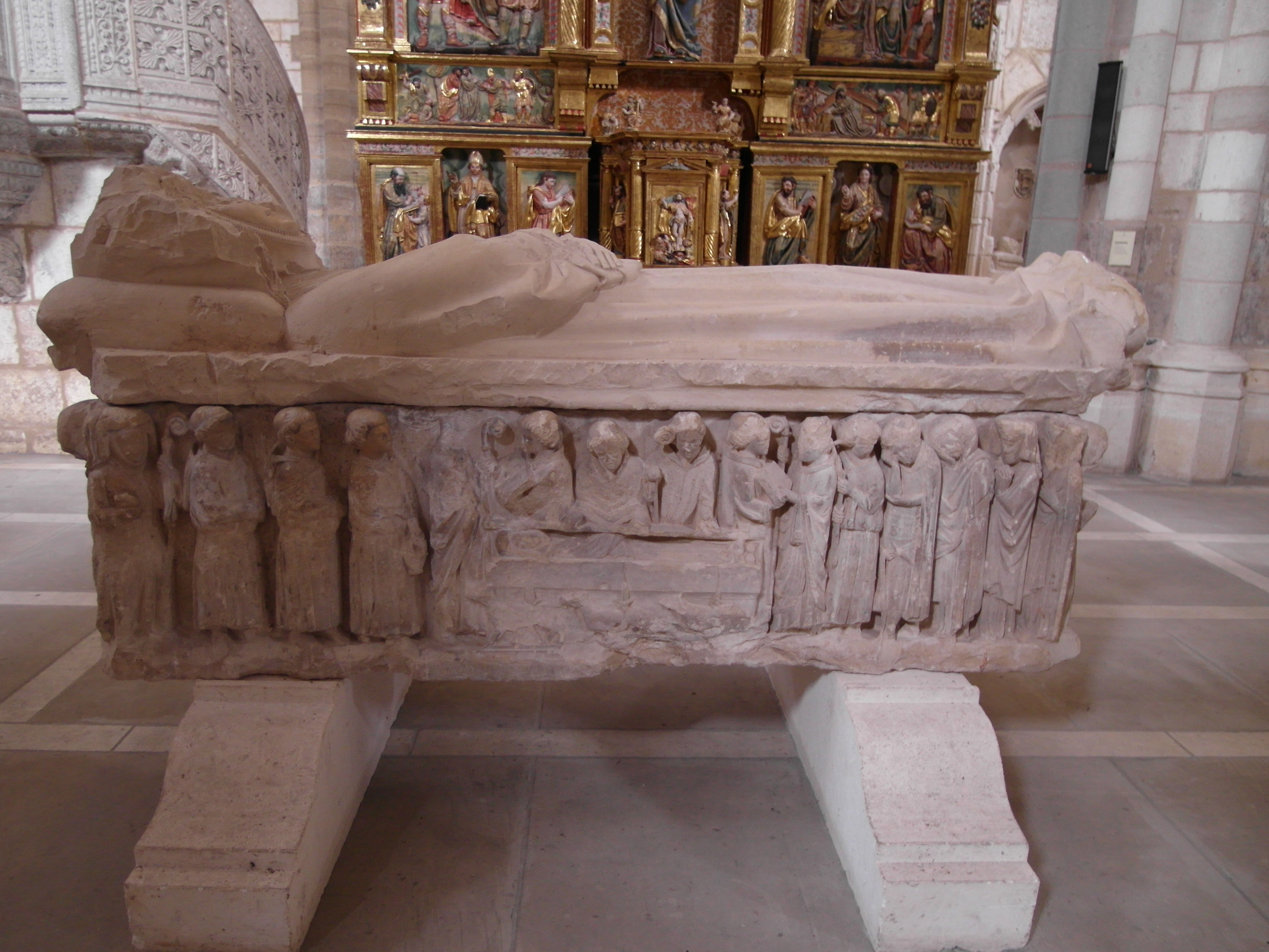 Iglesia de san Estaban, museo del Retablo, Burgos.